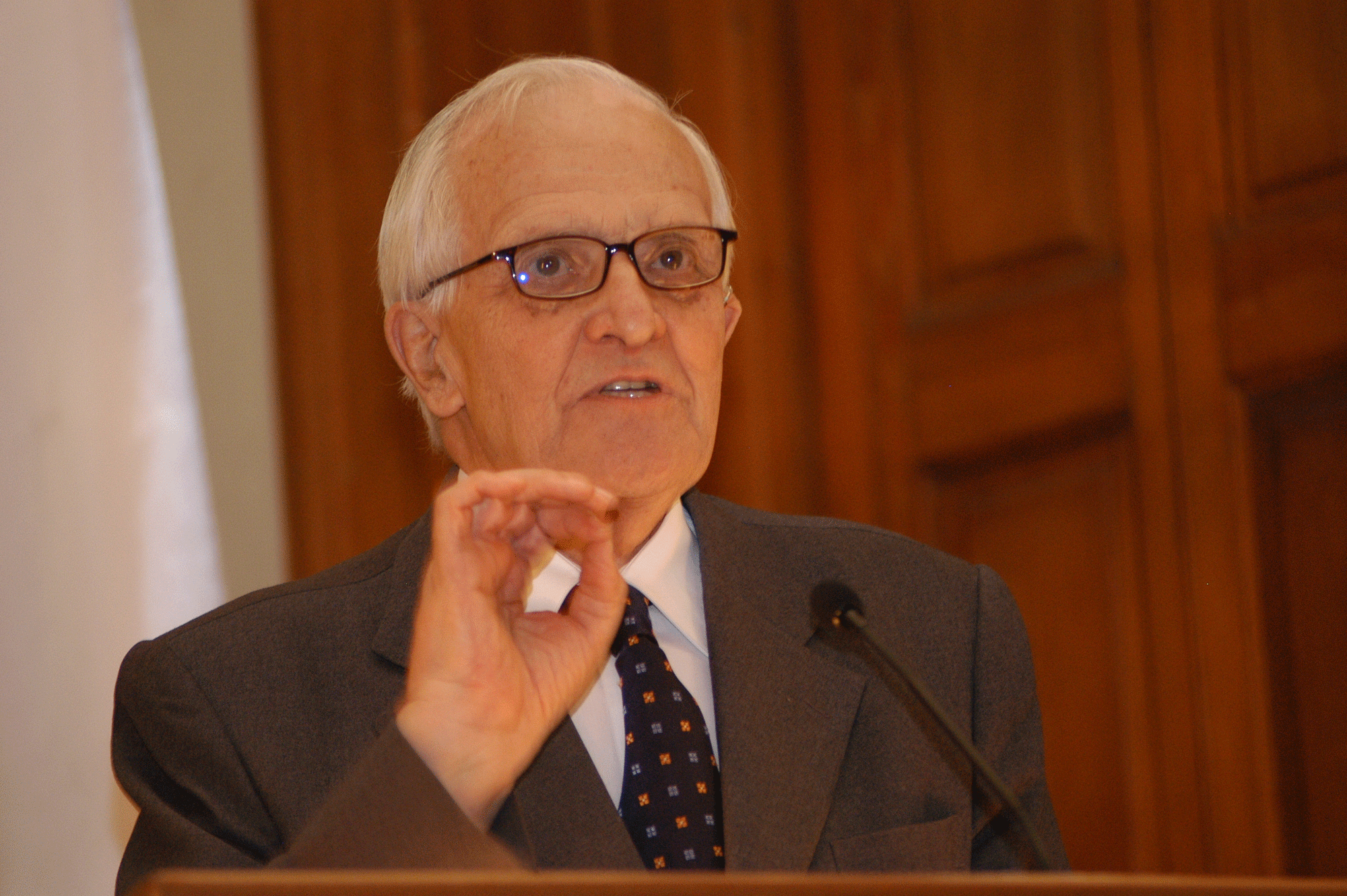 El galardón es entregado por la Universidad Austral de Chile.